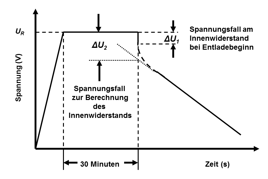 Messkurve zur Messung des Innenwiderstands von Doppelschichtkondensatoren